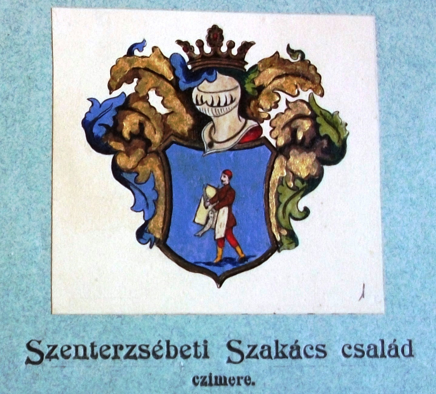 MNL OL lefotózta 2013-ban Sipos Béla